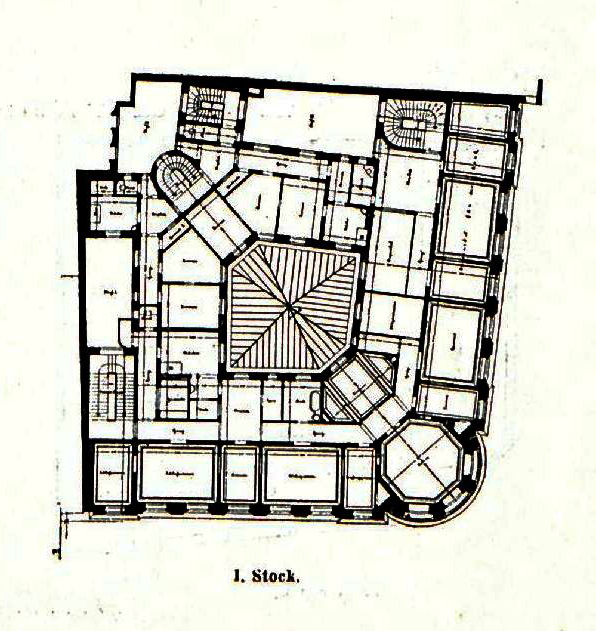 Bankgebäude Kardinal-Faulhaber-Straße 1 in München, 1898, Grundriss Erster Stock